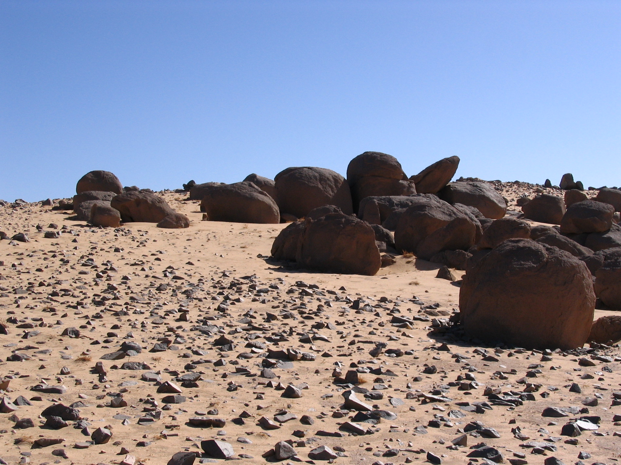 Hoggar